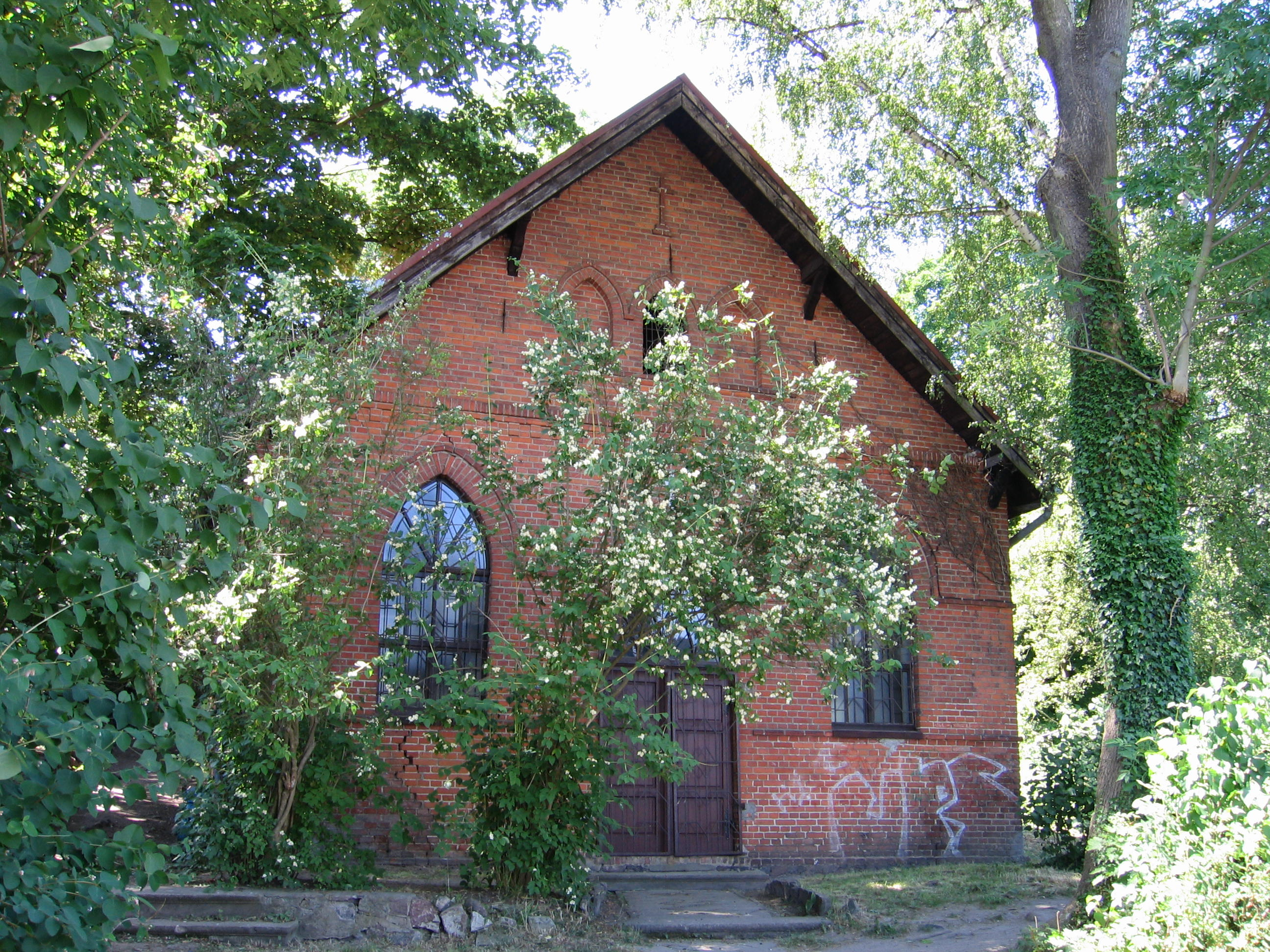 d. kościół nowoapostolski ob. cerkiew prawosławna Barlinek, Barlinek